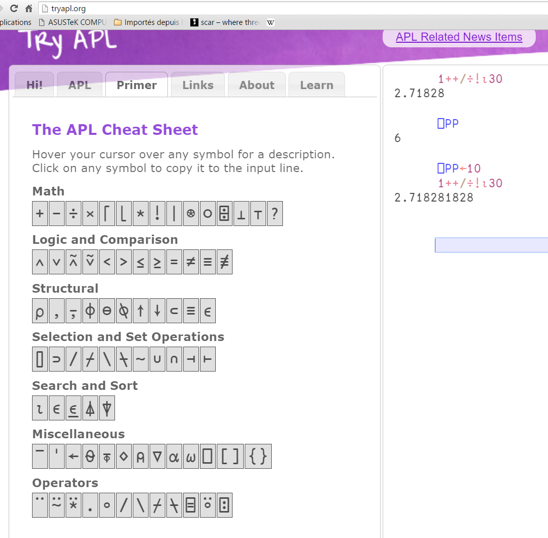 Utilisation de la page TryAPL pour frapper quelques expressions. Dyalog permet également de télécharger gratuitement une version complète de son interpréteur 32 bits pour des usages personnels et non commerciaux.